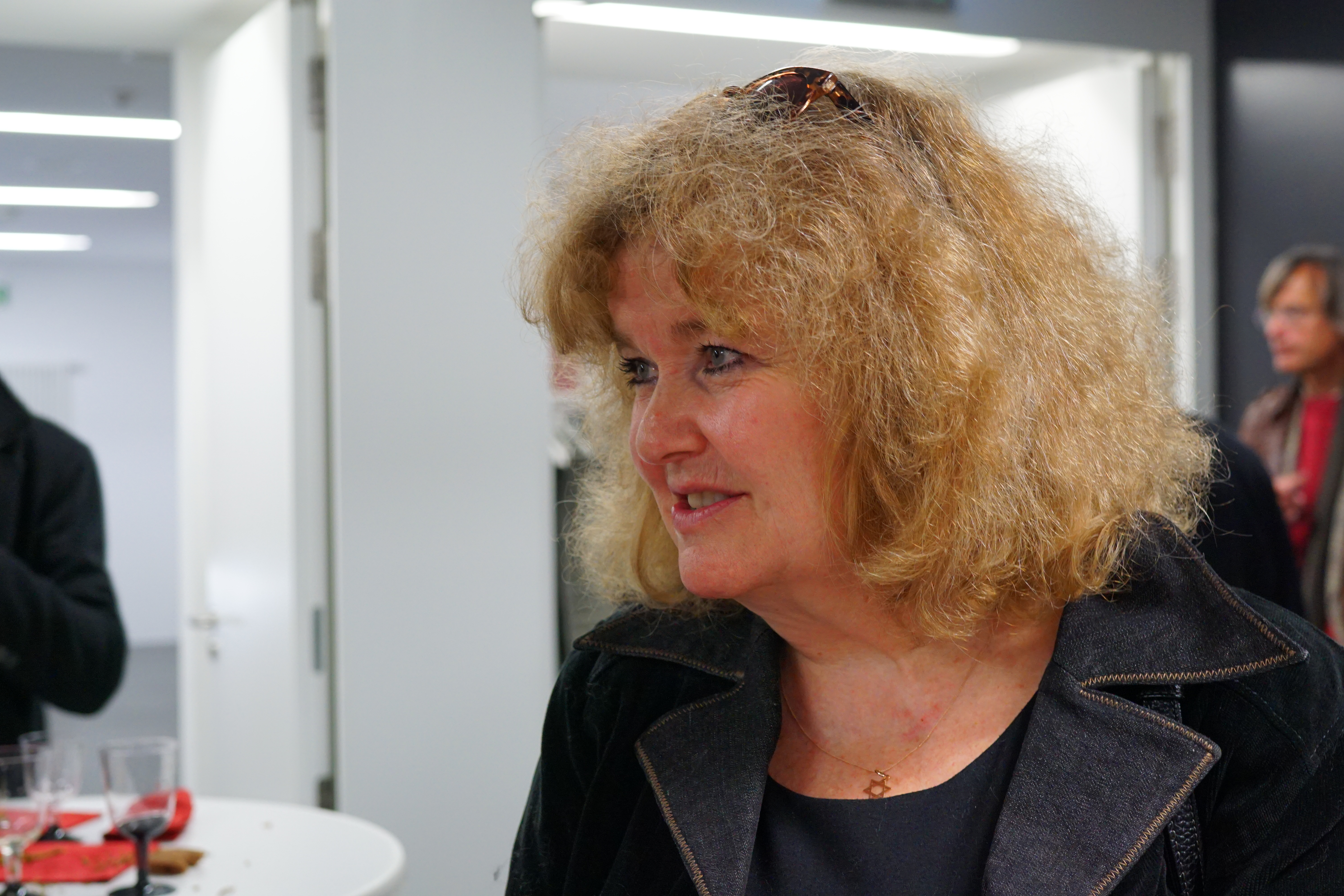 Barbara Traub, Vorstandssprecherin der Repräsentanz der Israelitischen Religionsgemeinschaft Württembergs.